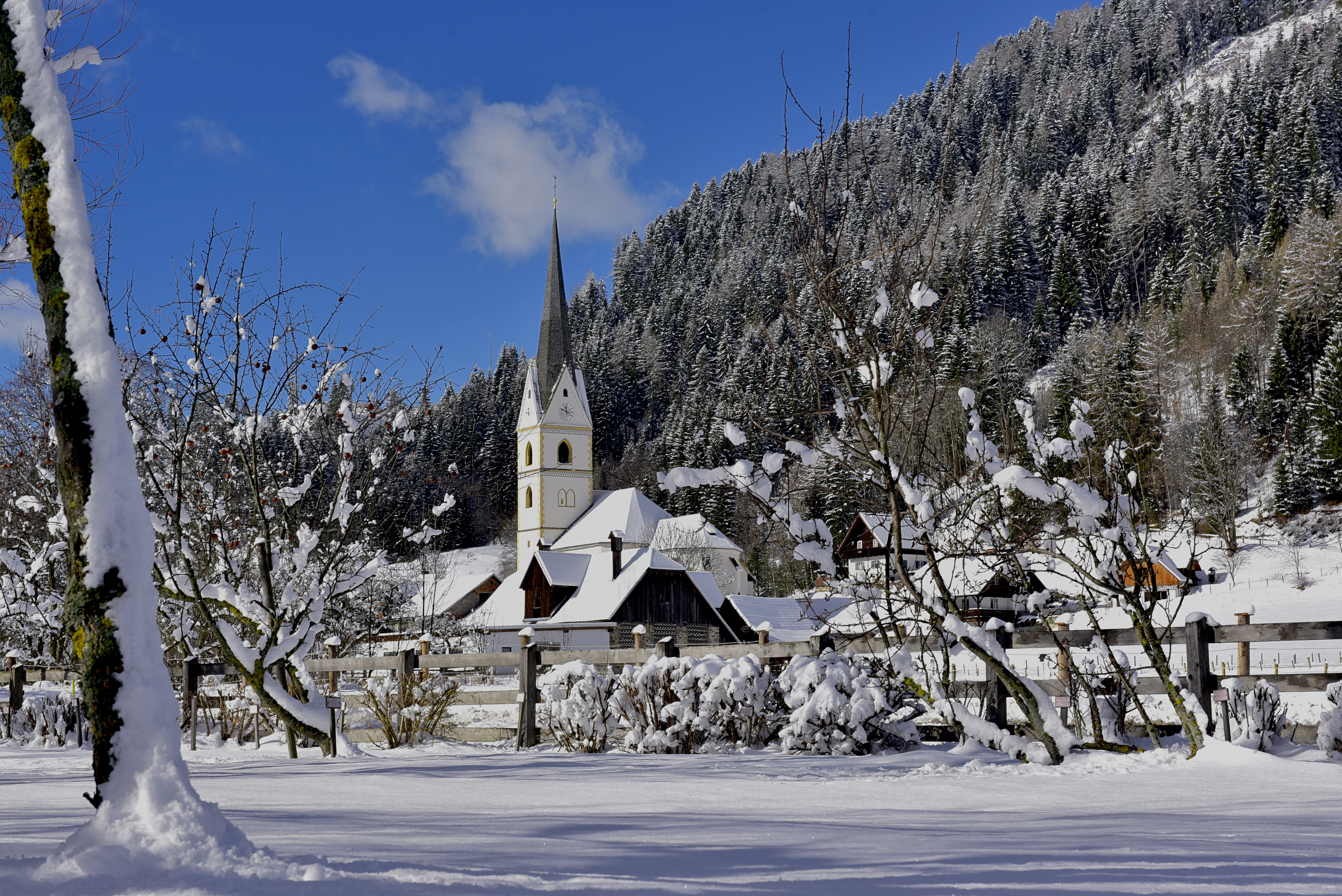 Schöder Ortseinfahrt Winter, mit Pfarrkiche Mariä Geburt, Blick von Richtung Baierdorf kommend